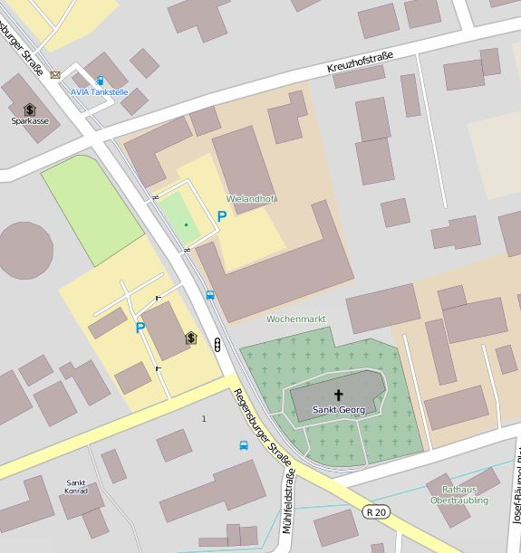 Lage des Wielandshof in Obertraubling